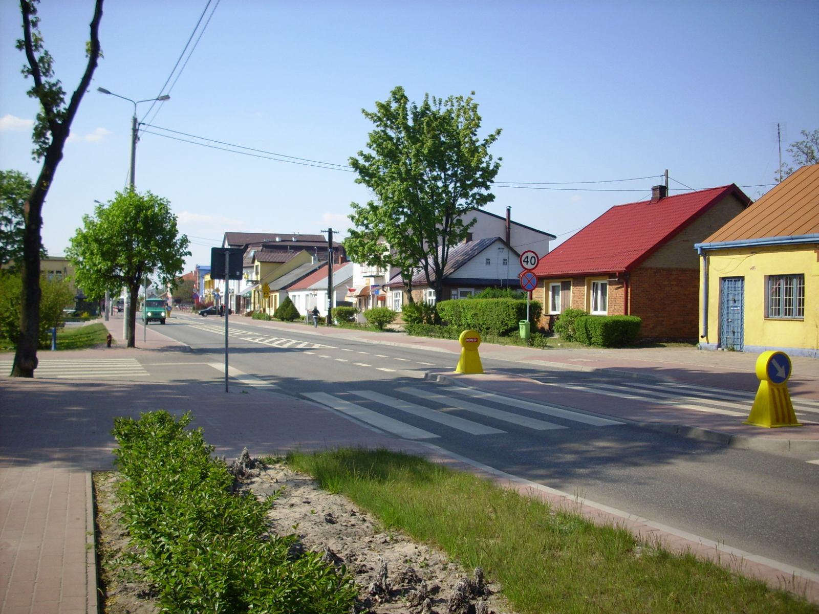 Wisznice. Centrum miejscowości.